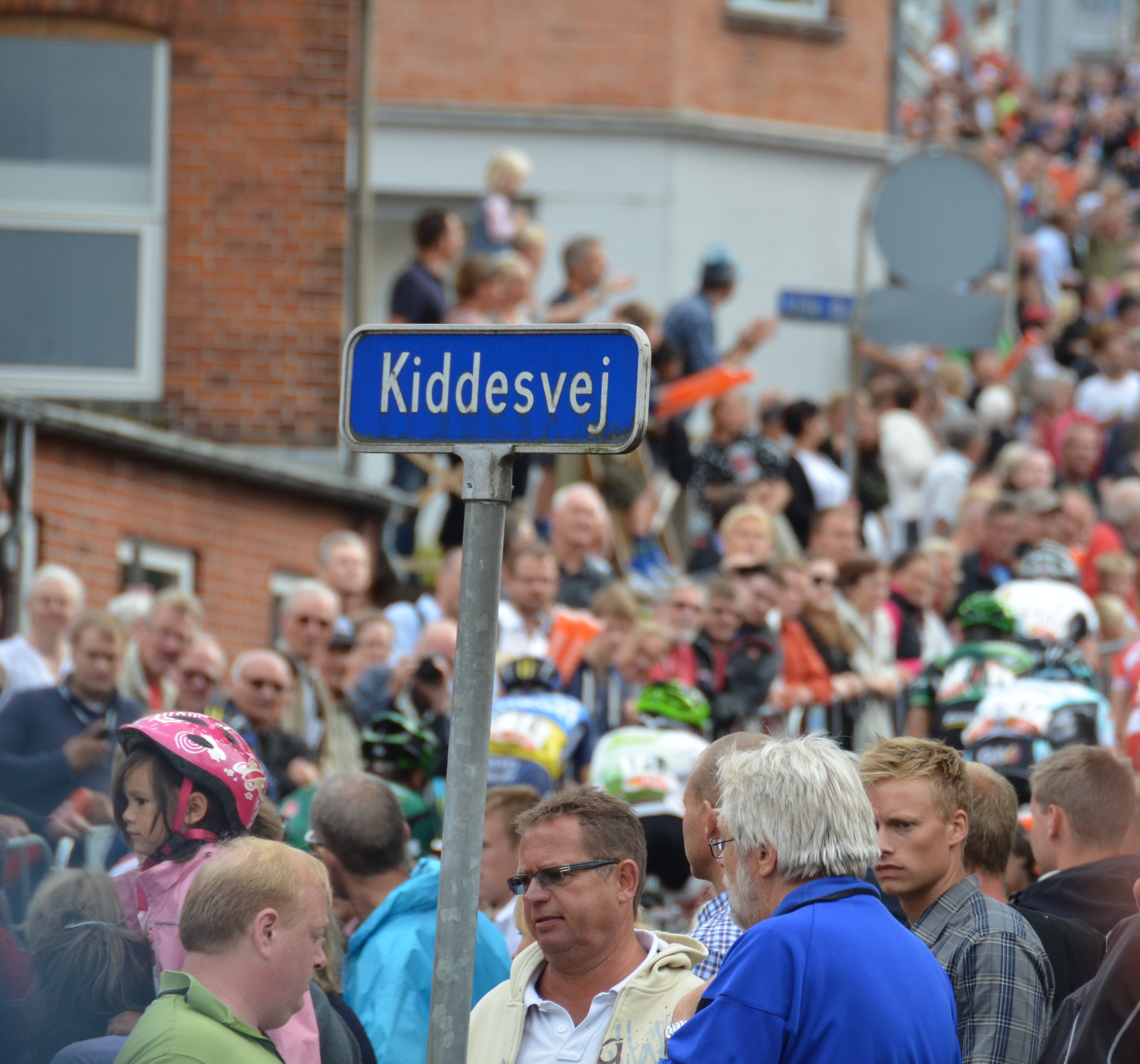 Post Danmark Rundt 2012 Vejle